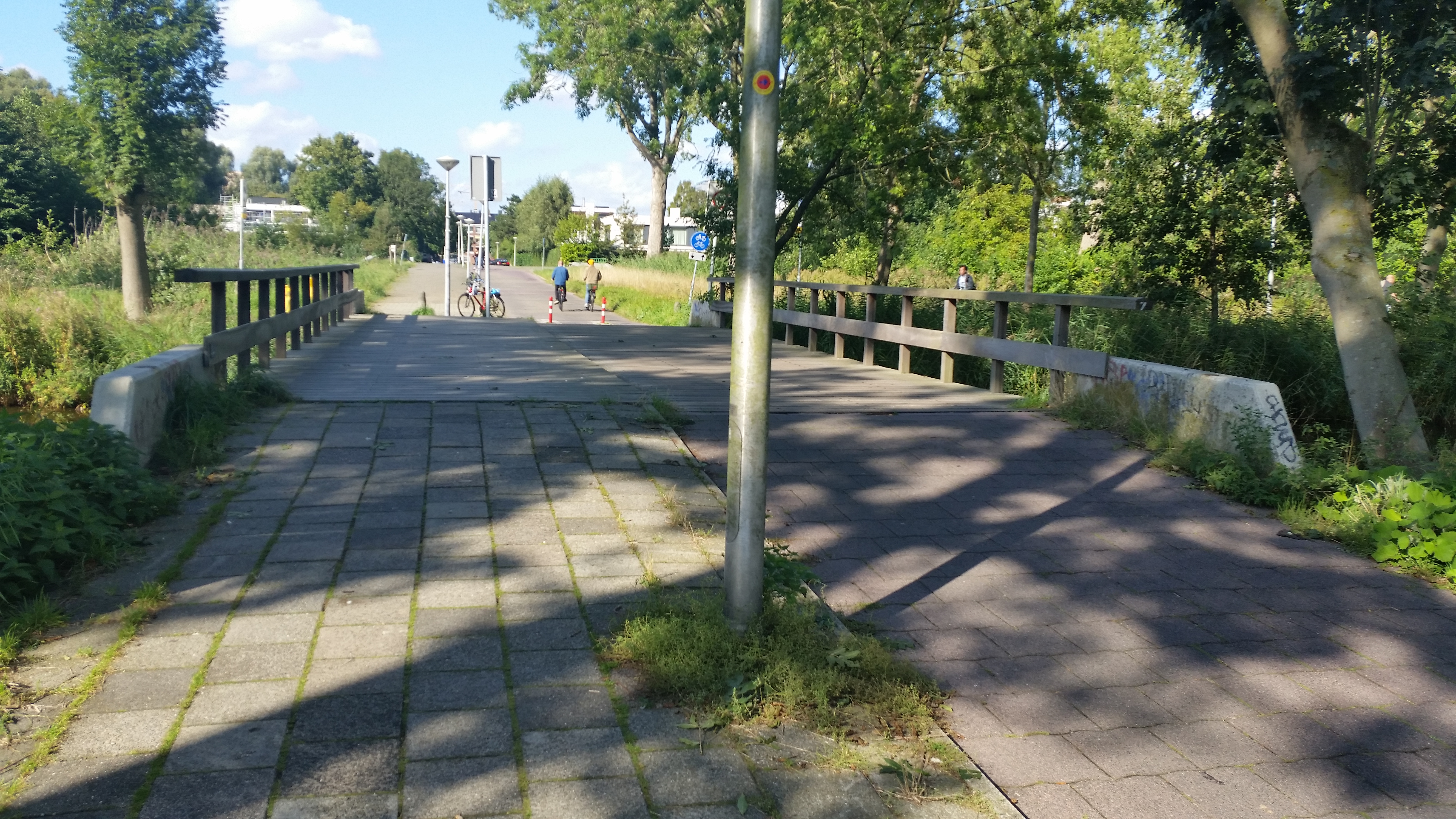 Brug Laan van Kronenburg, overzicht